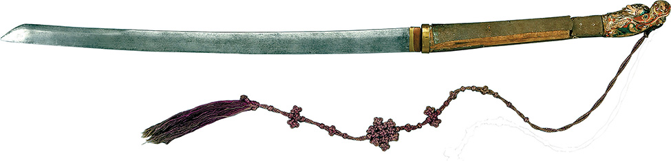 太祖李成桂の刀「伝御刀」